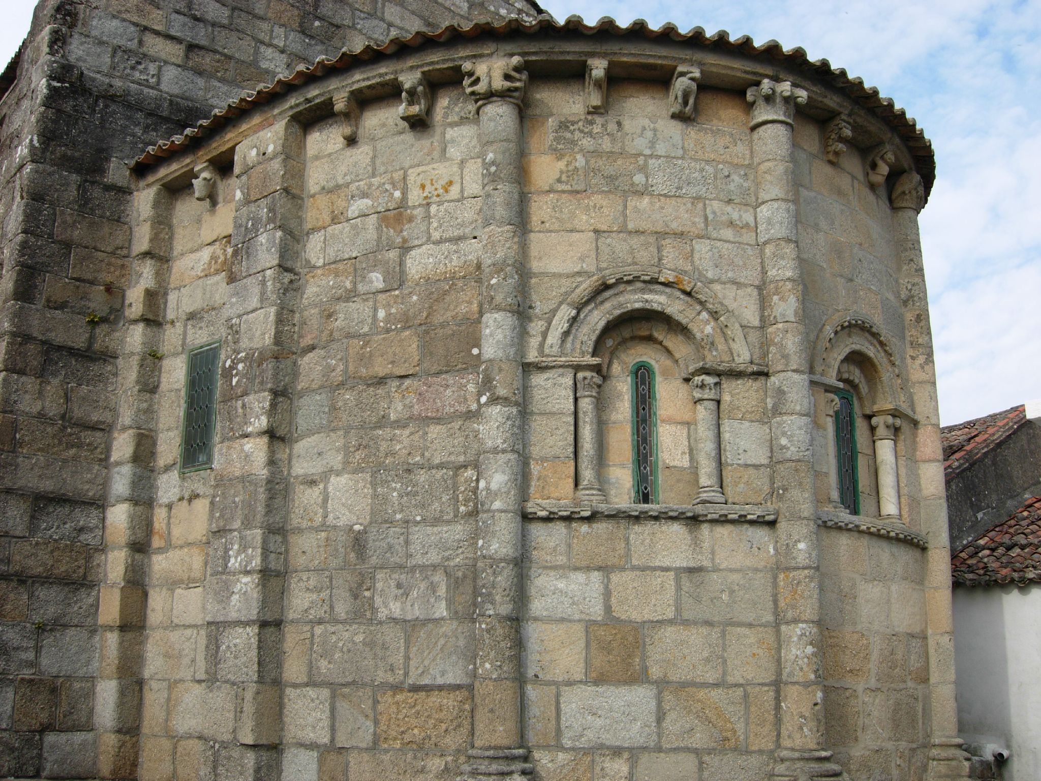 çAbsida da Igrexa de San MArtiño de Sobrán - Vilagarcía de Arousa - PontevedraIglesia de San Martiño de Sobrán